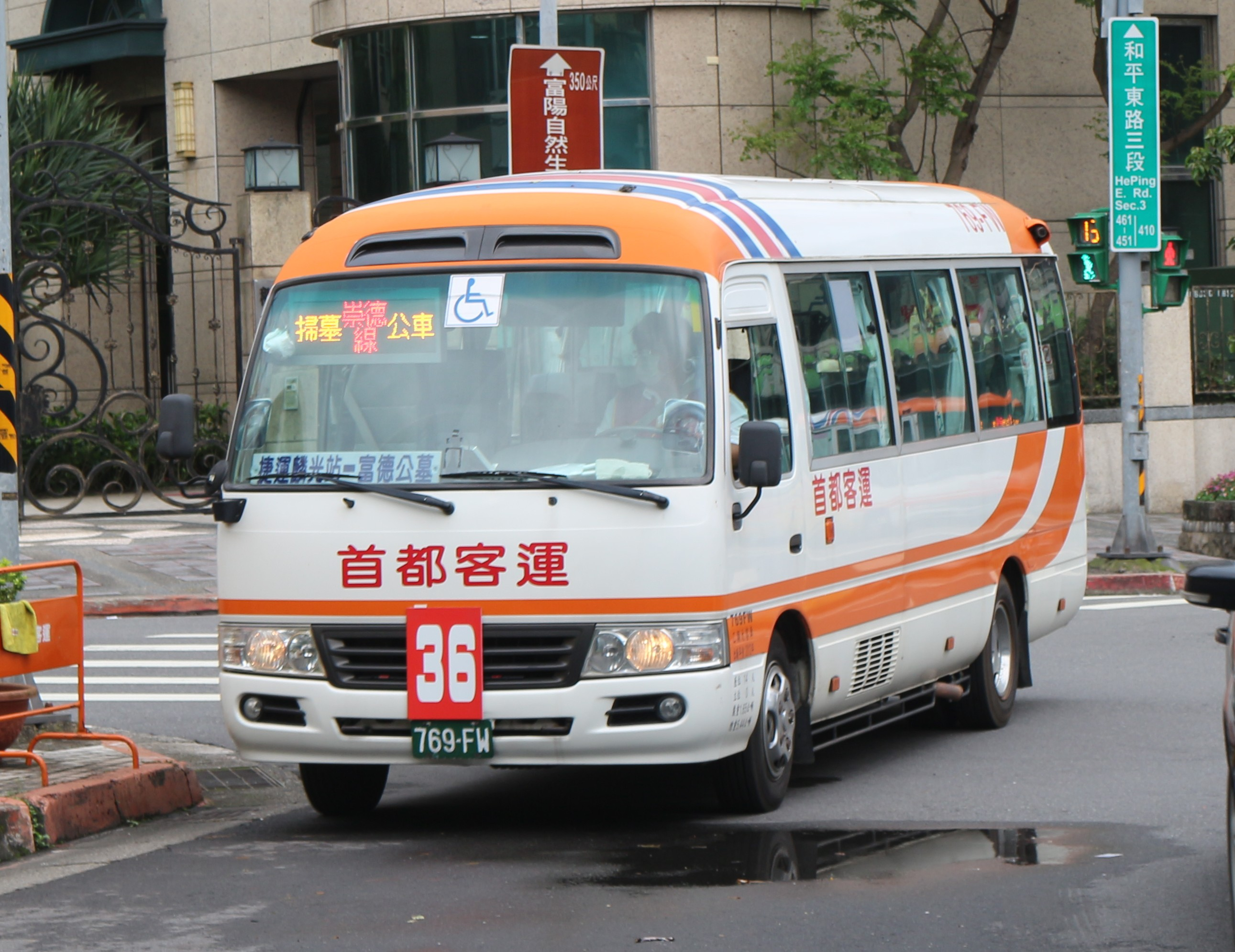 首都客運 769-FW 掃墓公車崇德線 中型復康巴士